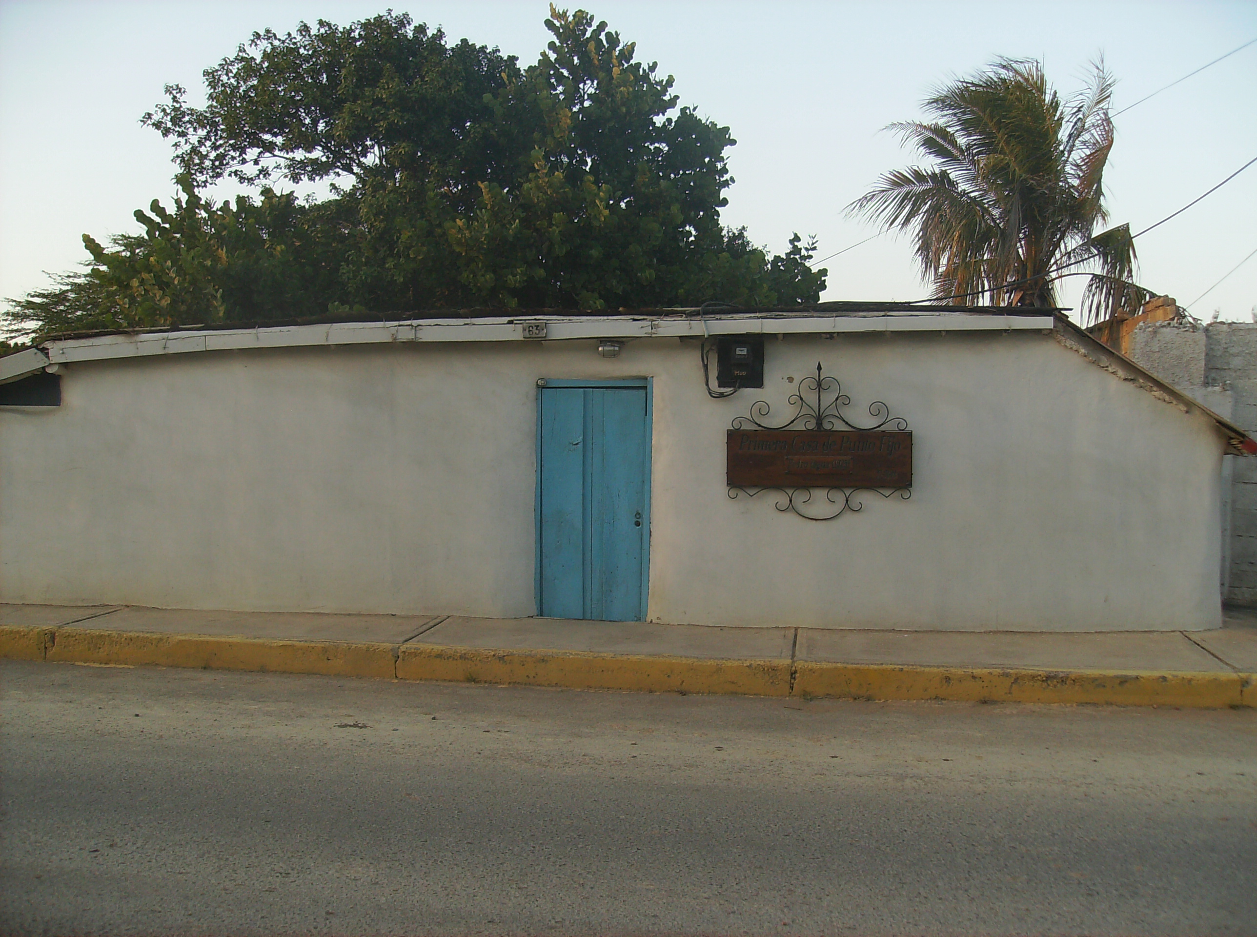 casa donde vivió el Sr.Pedro Yagua y su hijastra la esposa de Don Rafael Estaba